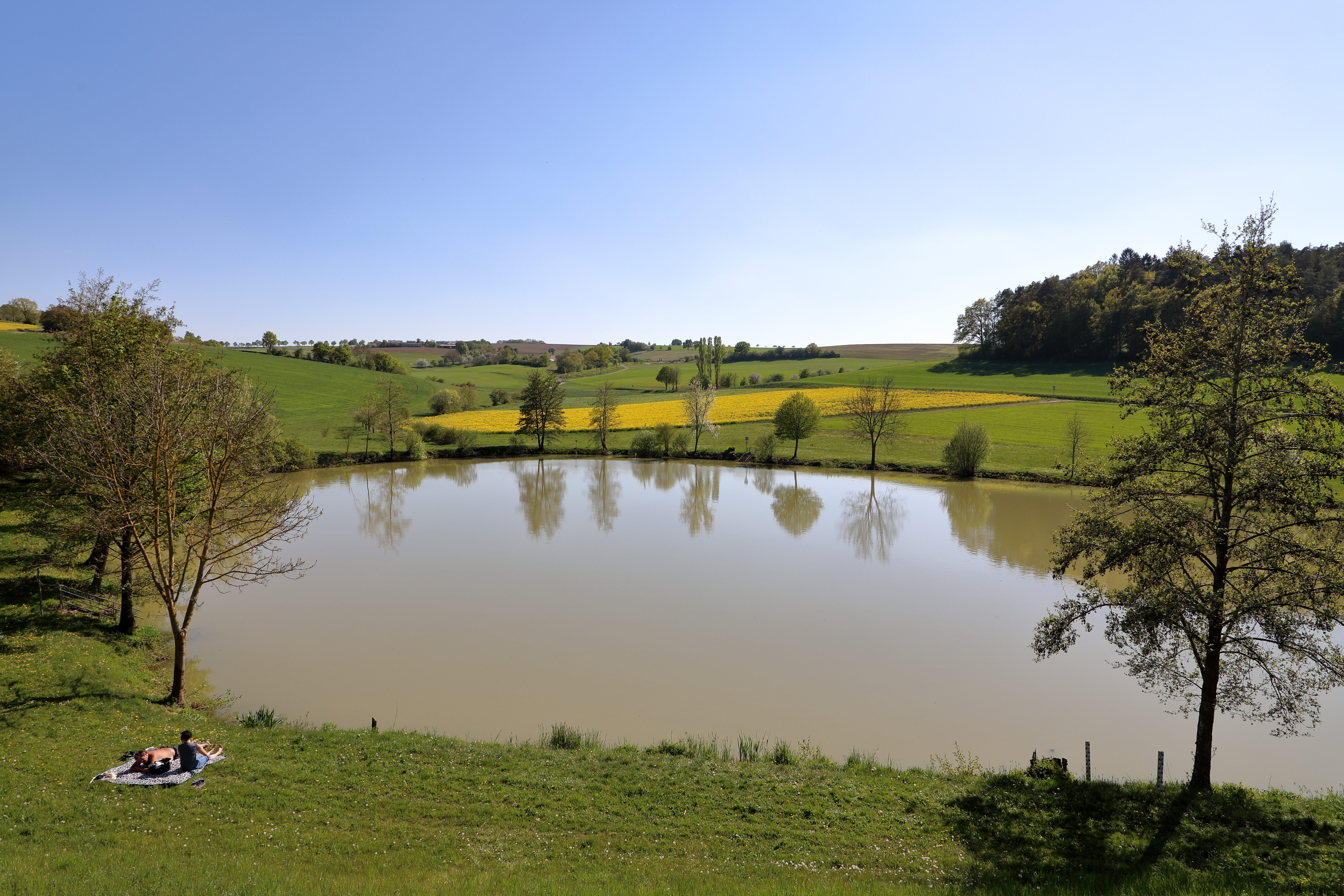 Der Hachteler See beim Bad Mergentheimer Ortsteil Hachtel im Frühjahr.